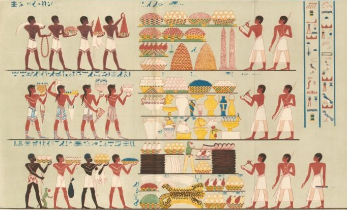 Große Prozession (Teil 2). Relief in der Grabkapelle des Wesirs Rechmire (TT100), Ägypten